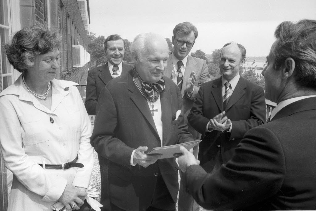 Joachim Klaiber (3.v.l.) bekommt zu seiner Pensionierung von Kultusminister Walter Braun (6.v.l.) auf dem Balkon des Kultusministeriums am Düsternbrooker Weg 64 die Auszeichnung verliehen. Im Bild links Frau Klaiber (1.v.l.) und im Hintergrund Jürgen Becker-Birck aus der Staatskanzlei Schleswig-Holstein (2.v.l.), Kulturdezernent Karl-Heinz Zimmer (4.v.l.) und Albert Rhode (5.v.l.) vom Orchestervorstand.